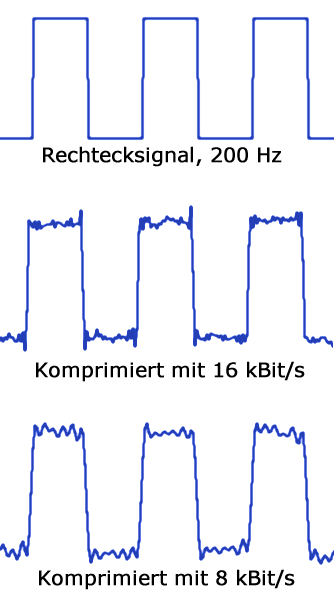 ein 200 Hz Recktecksignal wurde sowohl mit 16, als auch mit 8 kBit/s komprimiert. Benutzt wurde der Fraunhofer IIS MPEG Layer-3 Codec. Die für Fourier-Transformation typischen Obertöne kommen deutlich zum Vorschein, insbesondere die 12te Harmonische (2.400 Hz) bei 8kBit/s.